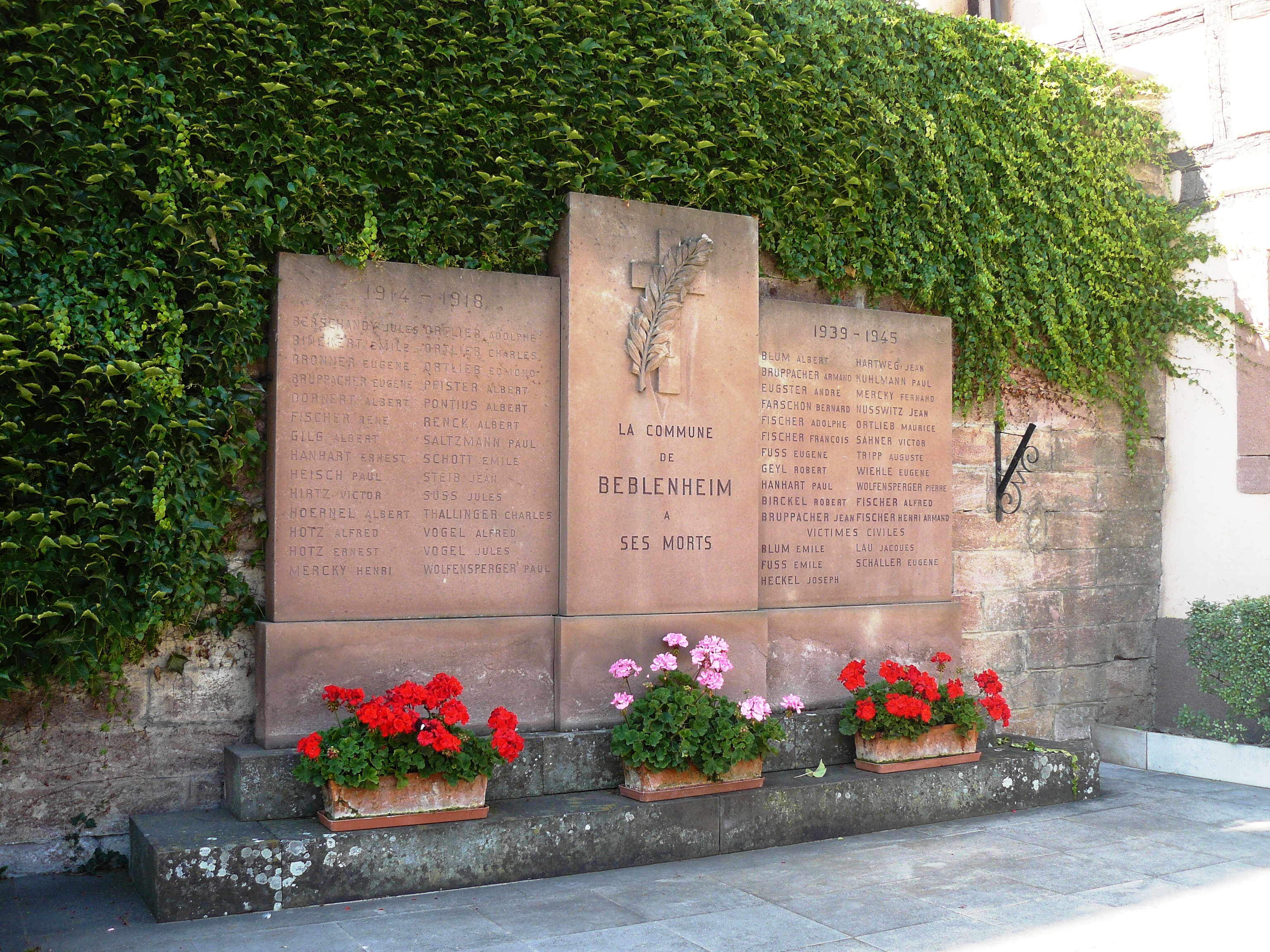 Le monument aux morts